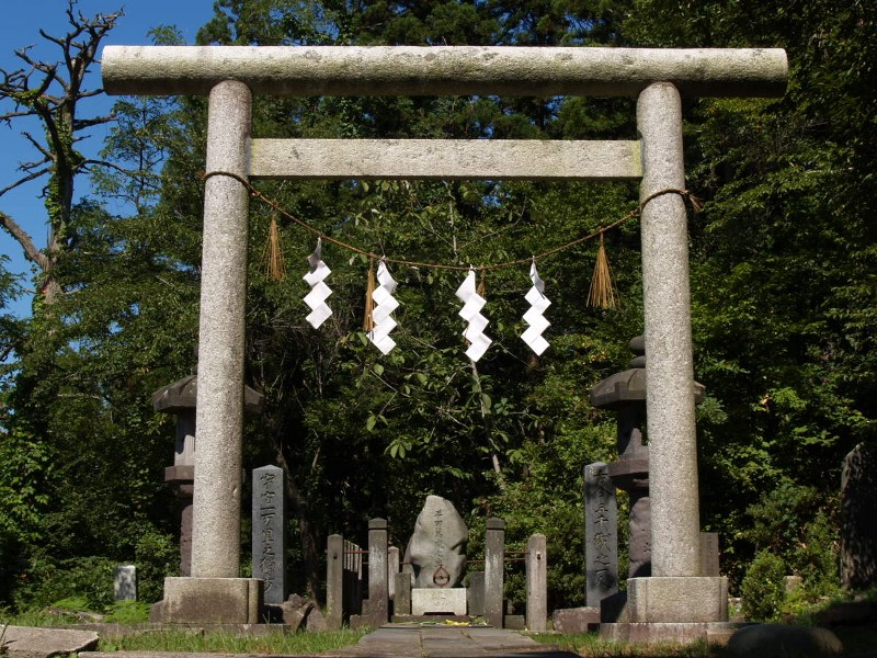 平田篤胤の墓 秋田市手形大沢 2007年9月24日 投稿者撮影 Grave of Hirata Atsutane, Akita, Akita, Japan